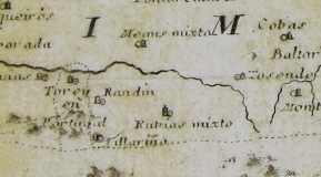 Parroquias do Couto Mixto no bispado de Ourense. Apréciase tamén Tourém, pertencente ó bispado galego desde antigo.